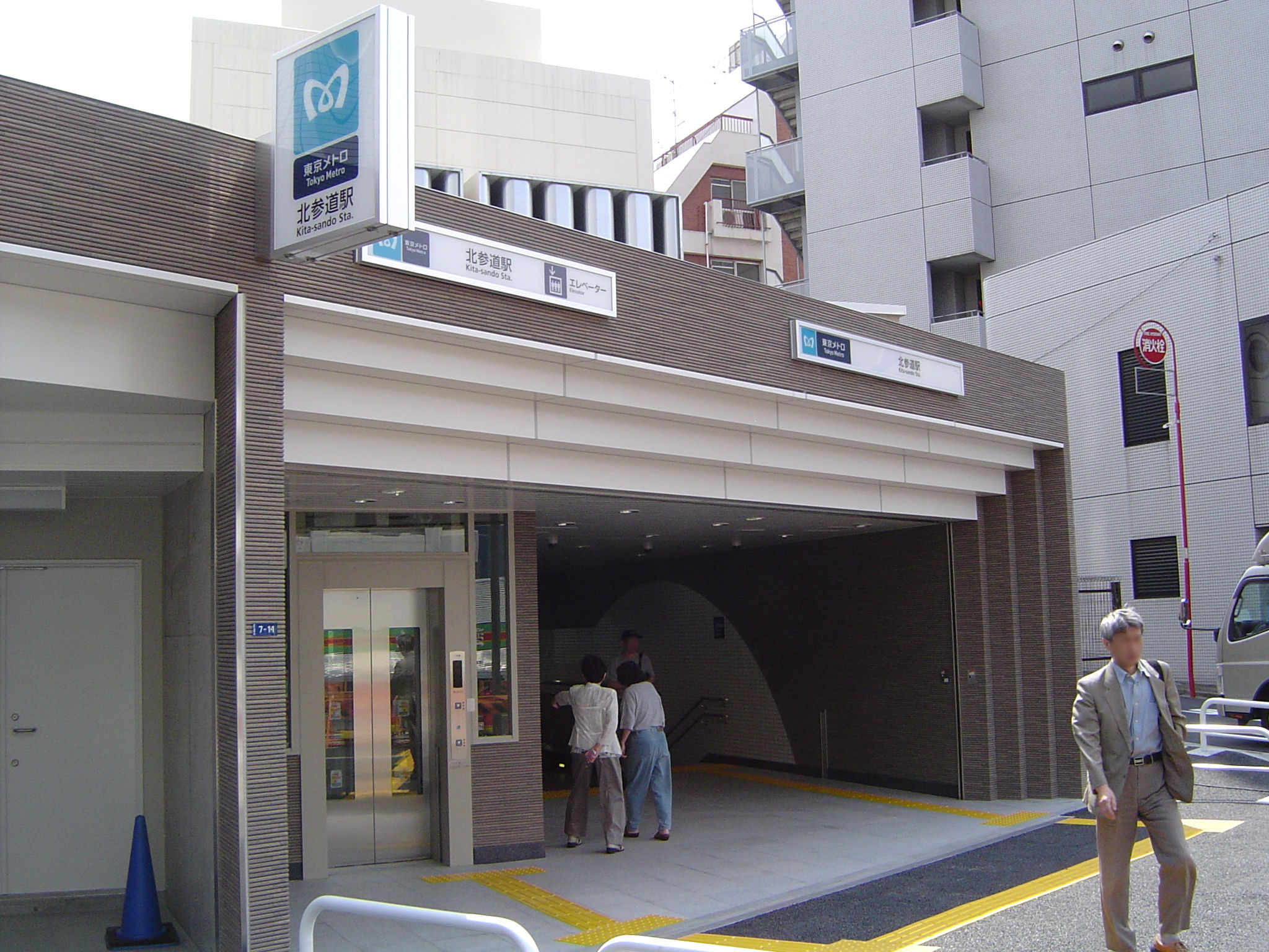 北参道駅（東京メトロ副都心線）1番出入口